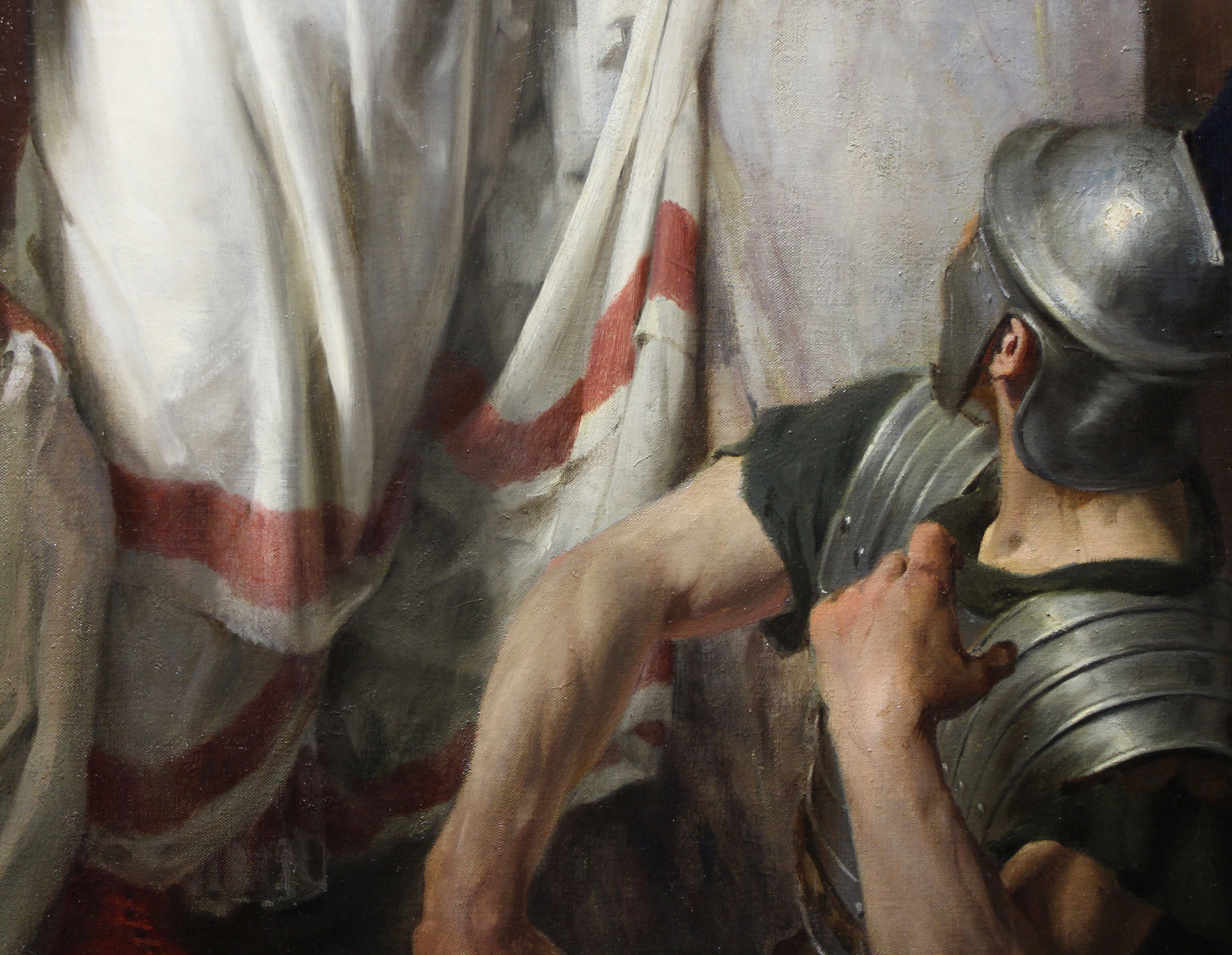 Claude nommé empereur, Charles Lebayle, 1886.